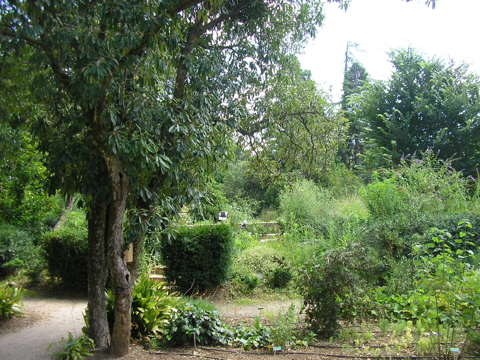 Jardin de l'Harmas de Fabre à Sérignan